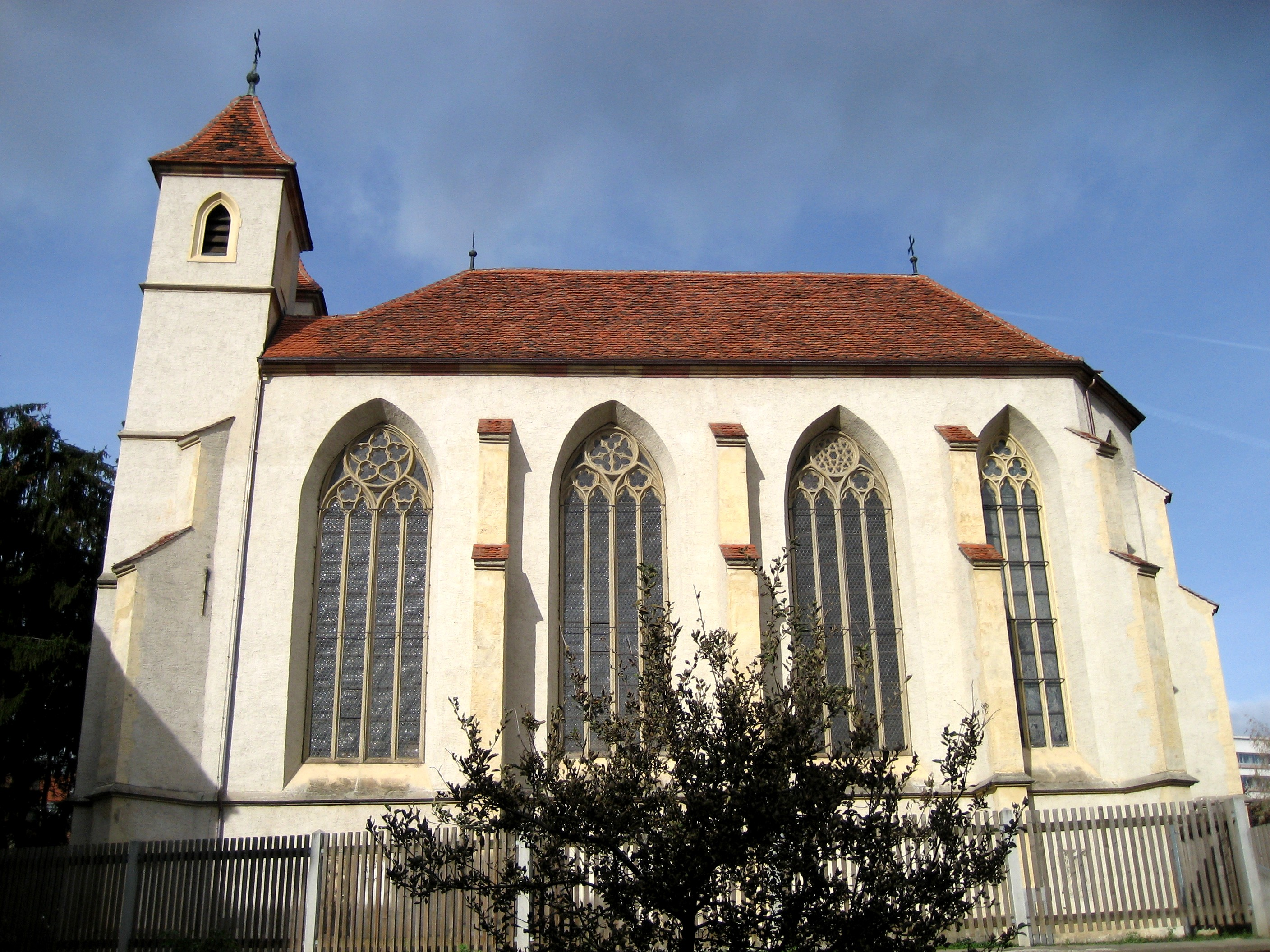 Leechkirche in Graz, älteste erhaltene Kirche der Stadt Graz (Leechkirche in Graz, Austria)